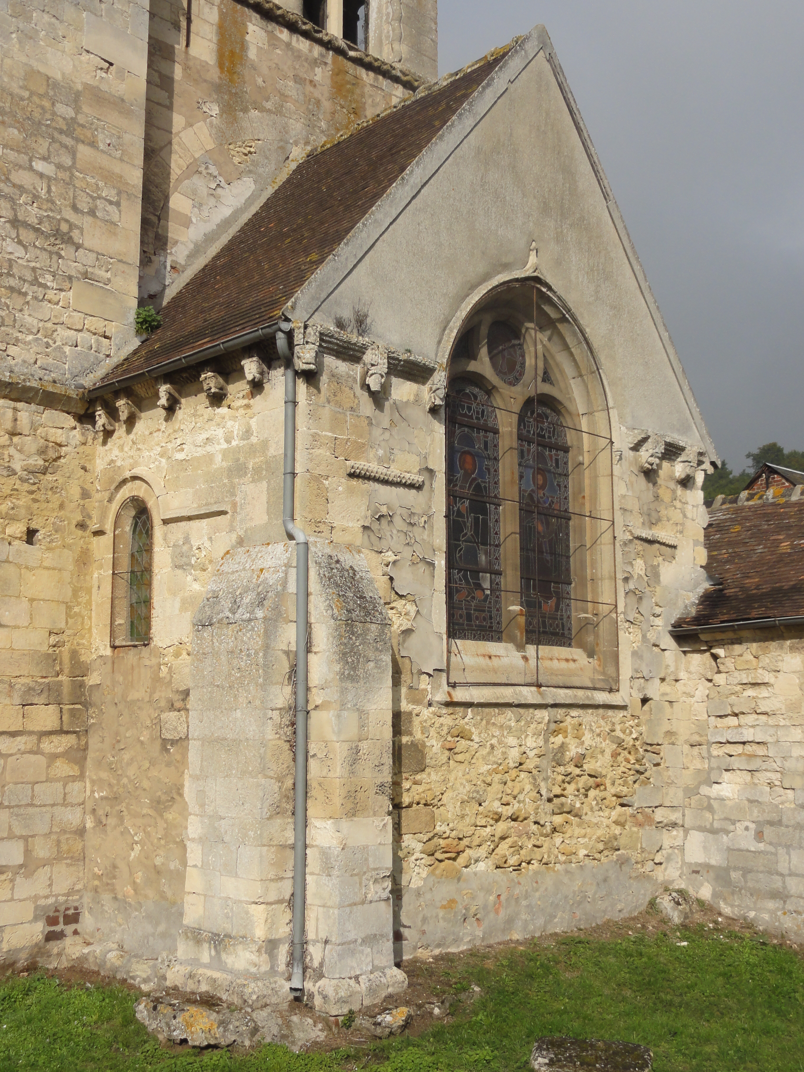 Église Saint-Pierre-et-Saint-Paul de Labruyère - voir titre.